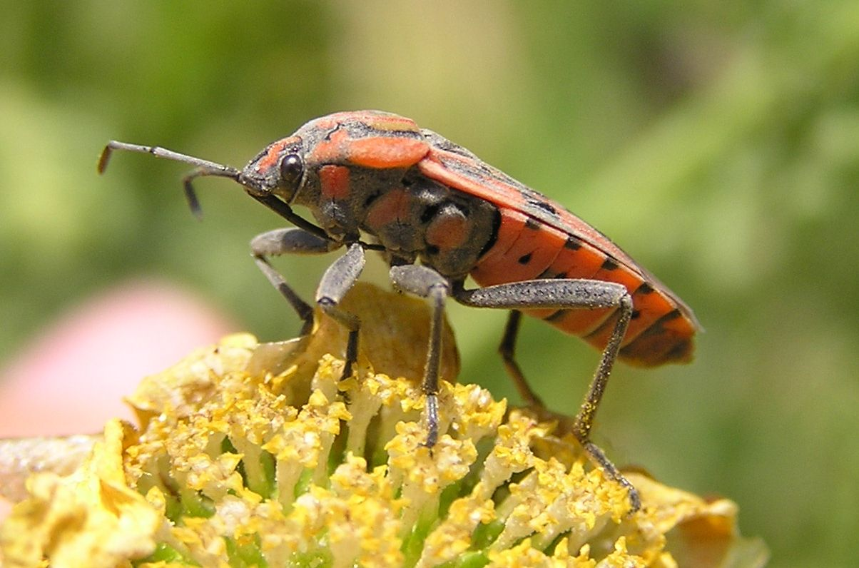 Spilostethus pandurus, taken in Jerusalem, Israel